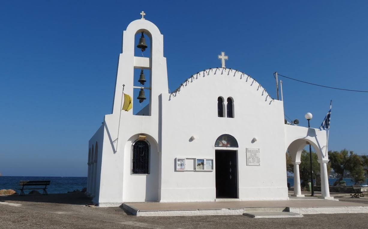 Avlaki - Eglise d'Aghia Marina